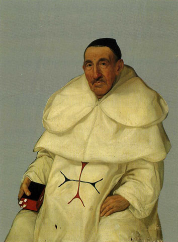 Miguel Ferrer Bauzà